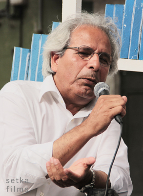 Salah Al-Hamdani au festival Voix Vives 2012, Sète